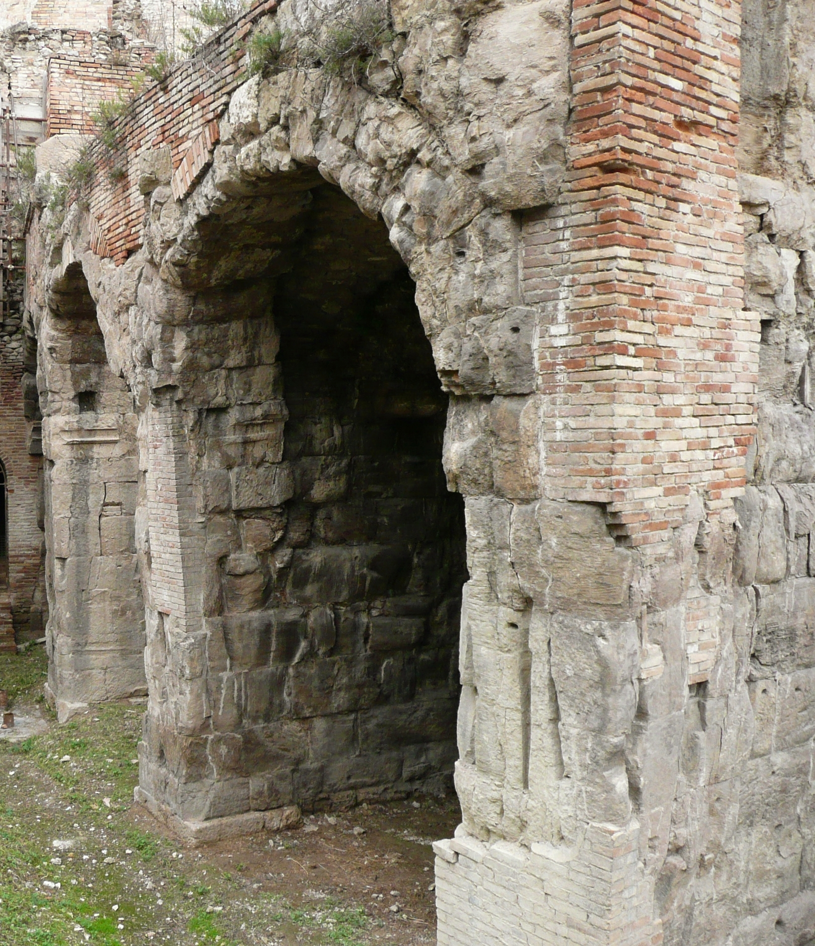 Teatro romano di Teramo, le due arcate visibili.